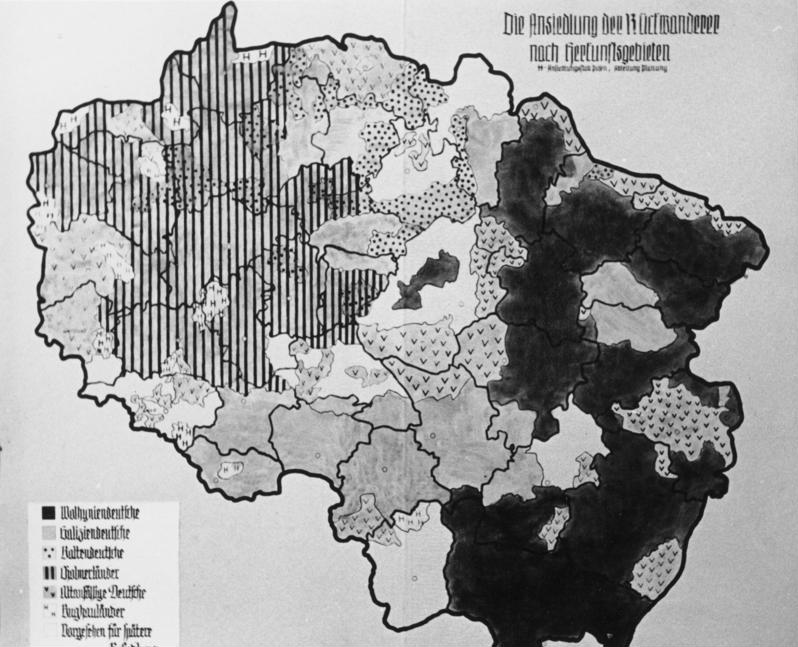 Grafik, Ansiedlung im Wartheland Wartheland/Ansiedlung Karte: die Ansiedlung der Umsiedler nach Herkunftsgebieten; 1940 [Grafik, Karte.- Ansiedlung deutschstämmiger Umsiedler im Watheland]